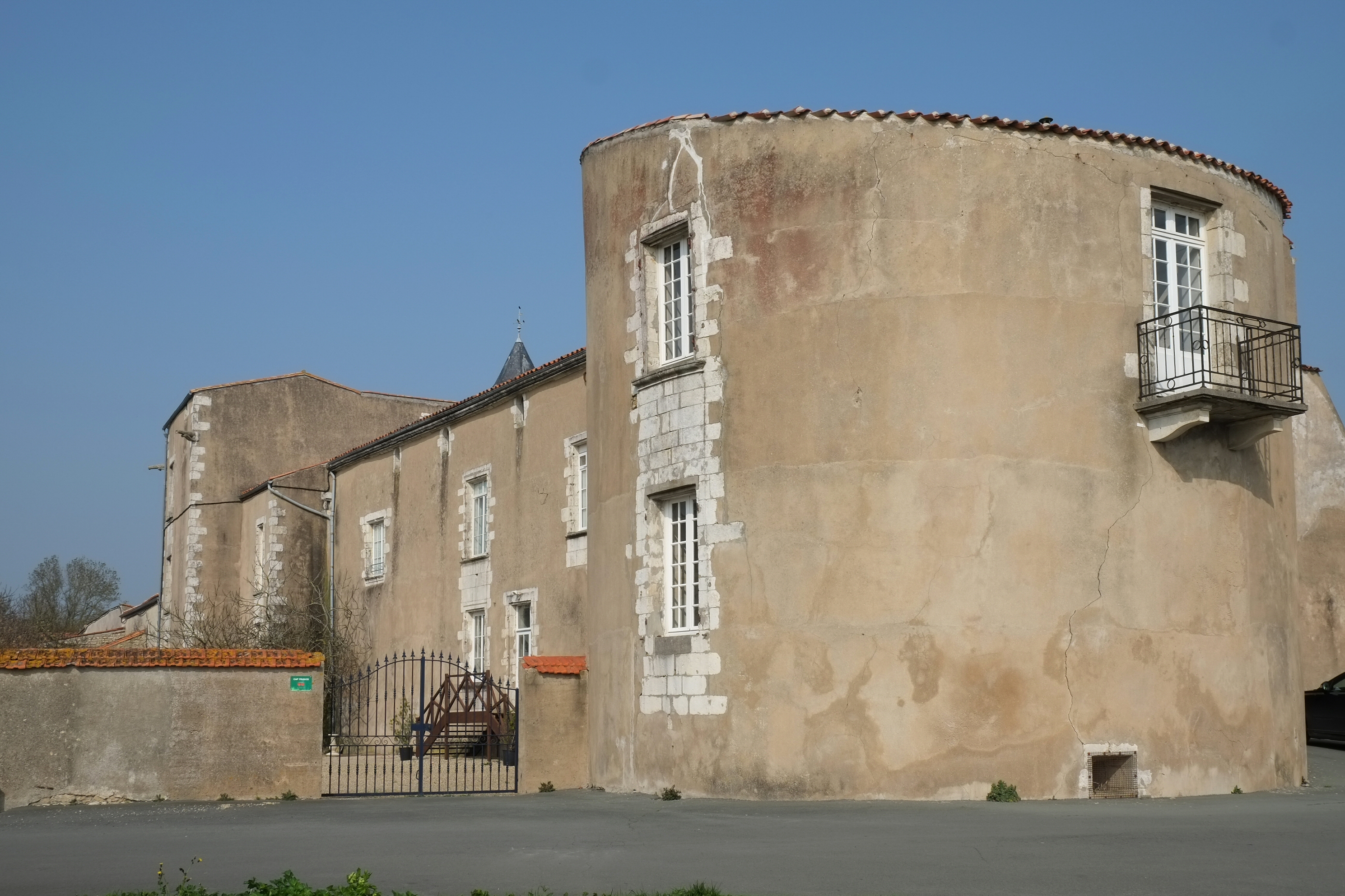 Tour médiévale du château Charron Charente-Maritime France